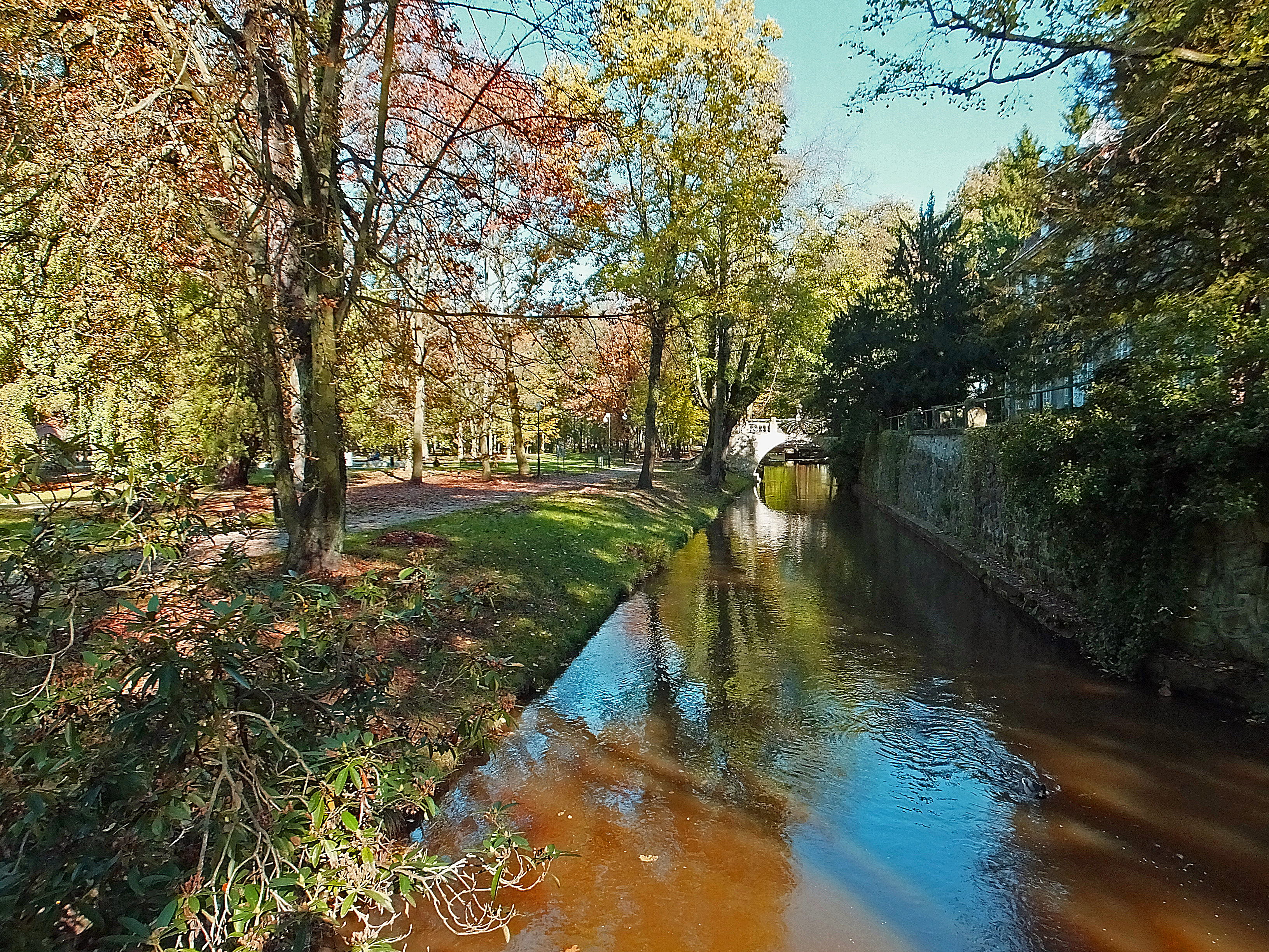 Iłowa, Park, rzeka Czerna Mała opływa pałac